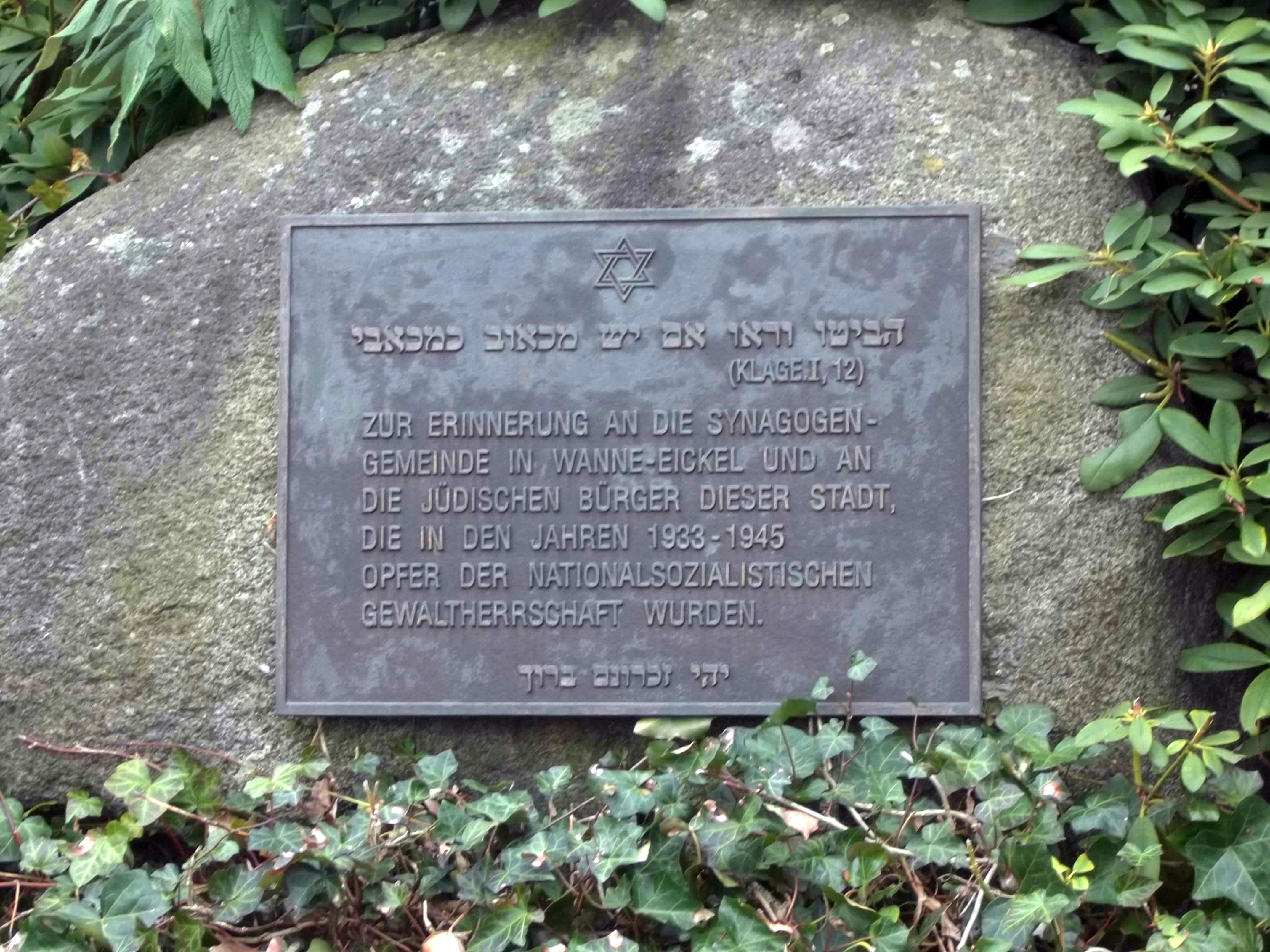 Gedenkstein Jüdische Gemeinde Herne-Wanne-Süd am Sportpark, Hauptstraße. Umgesetzt im November 2013 an den Standort der ehemaligen Synagoge in der Langekampstraße.